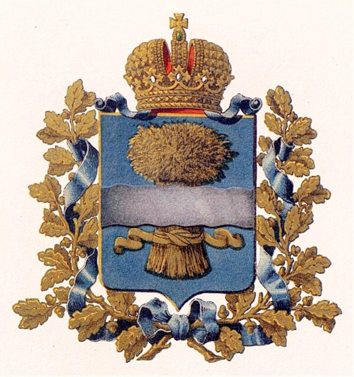 Official Russian Empire coat of arms Varshava Governorate. Герб Российской Империи Варшавская губернии в Гербовнике Министерства внутренних дел Российской Империи 1880 года. Утверждён Императором Всероссийским Александром Вторым.